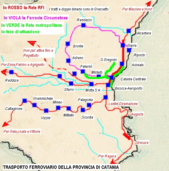 Mappa della rete ferroviaria della Sicilia nel 2007.